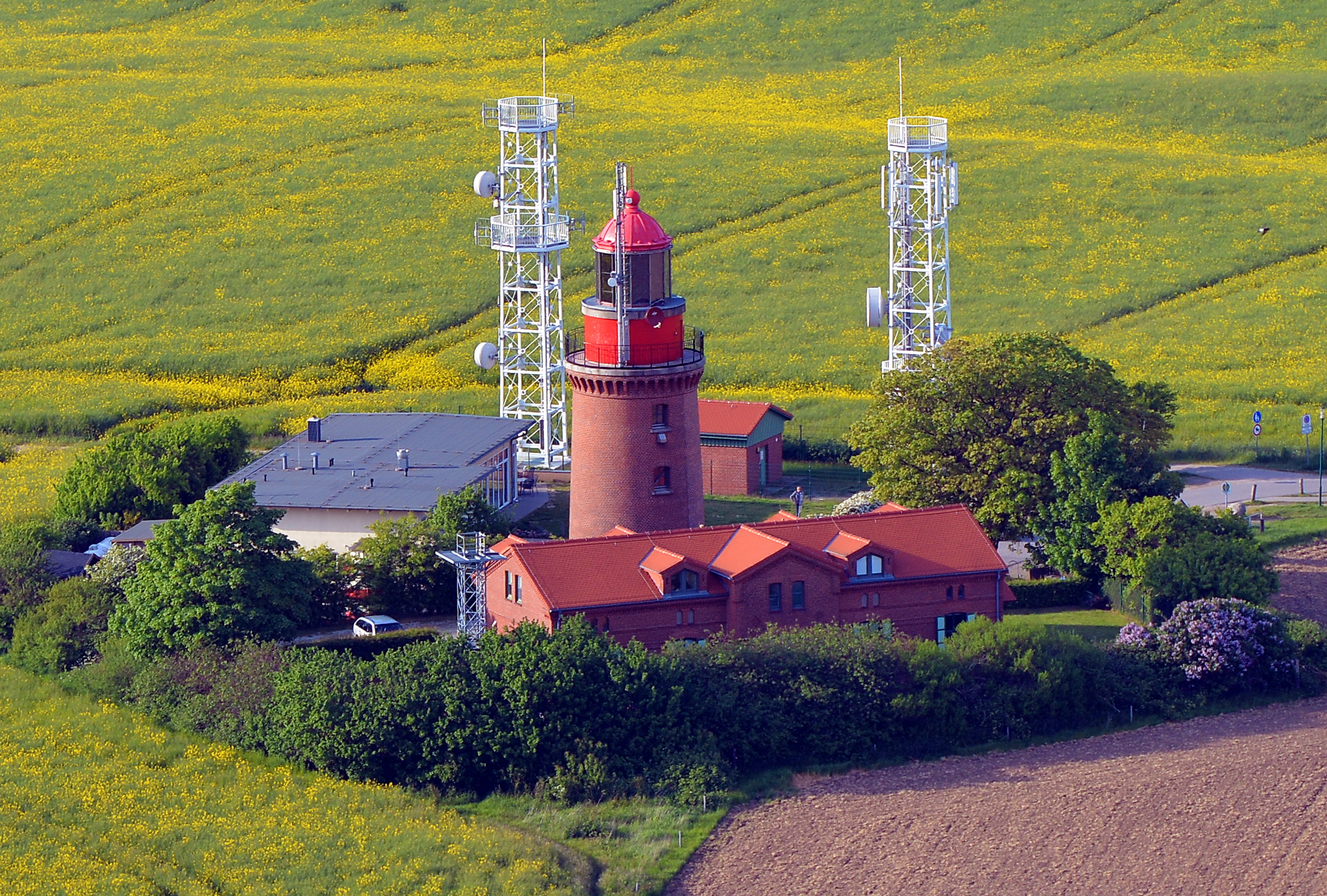 Höchster Standort eines Leuchtturms an der Ostseeküste